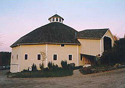 Joslin Round Barn Farm, Waitsfield, Vermont.